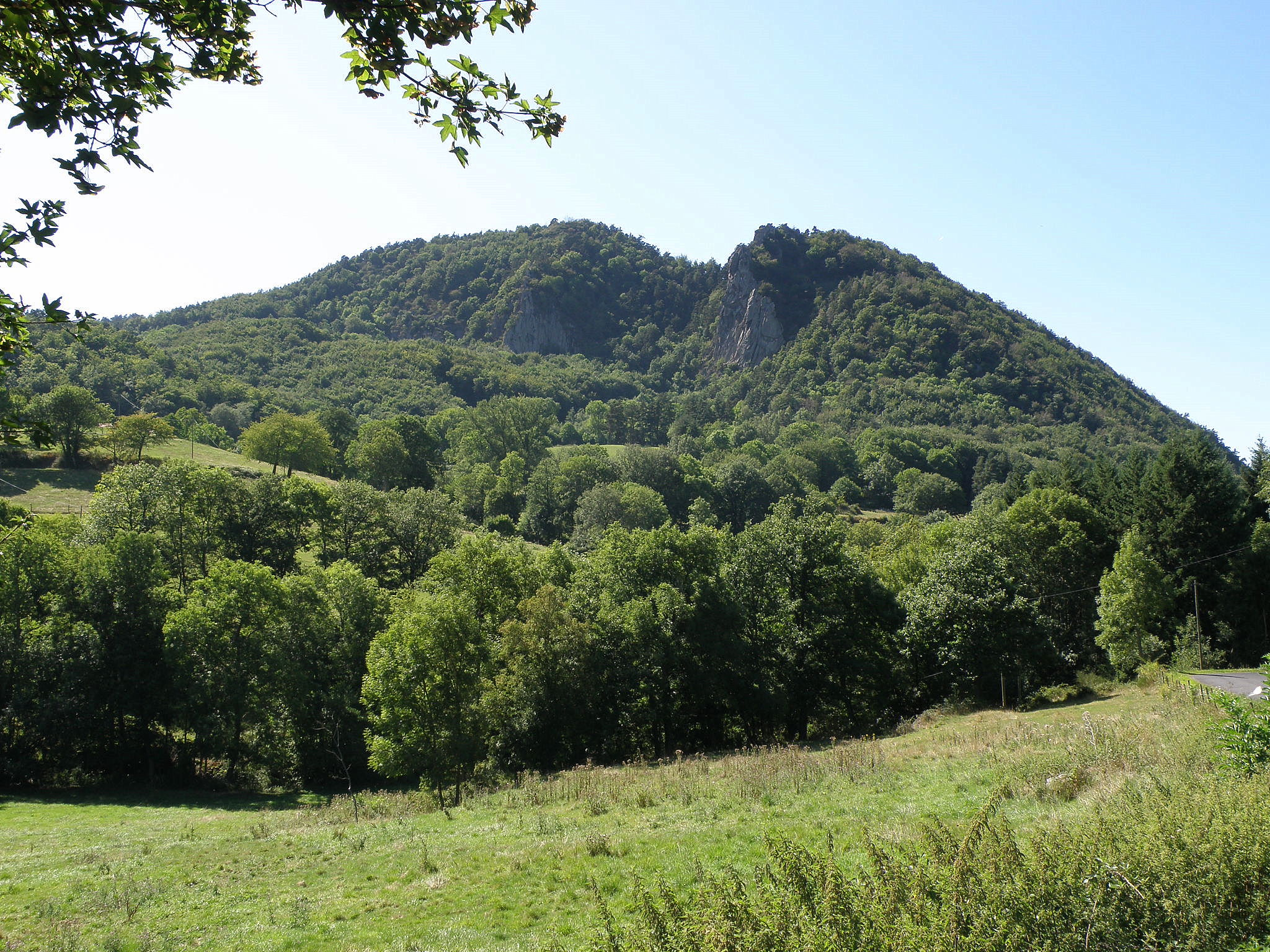 Chamalières-sur-Loire, comm. dans le départ. de la Haute-Loire, France (région Auvergne). Suc de Bartou, dans le sud-ouest de la commune. Vue prise de l'est, depuis la départementale D35 vers Blanlhac. Le suc comporte deux sommets : le rocher de Costaros, à droite (alt. 948m.), et le sommet proprement dit, à gauche (alt. 984m.).